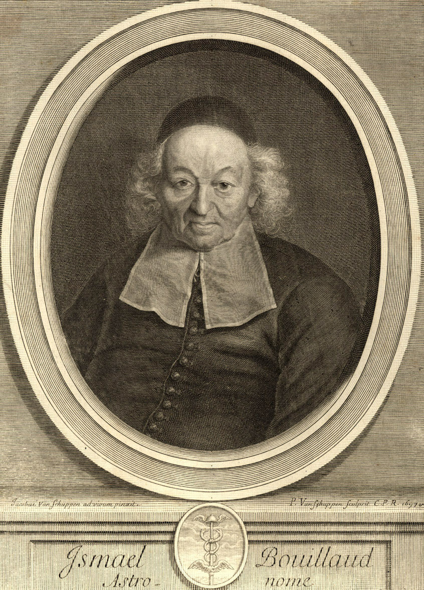 Der französische Astronom und Mathematiker Ismael Boulliau/Ismaël Bullialdus (1605-1694)